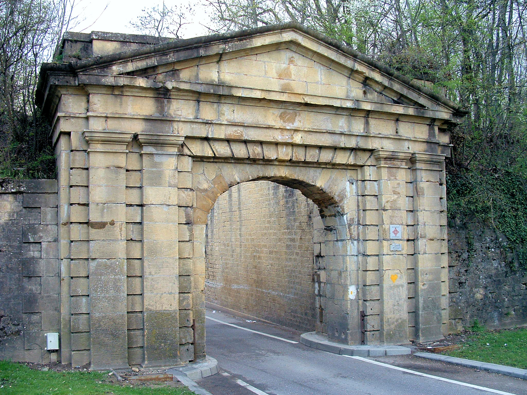 Double couronne de Bellecroix - Porte de Sarrelouis